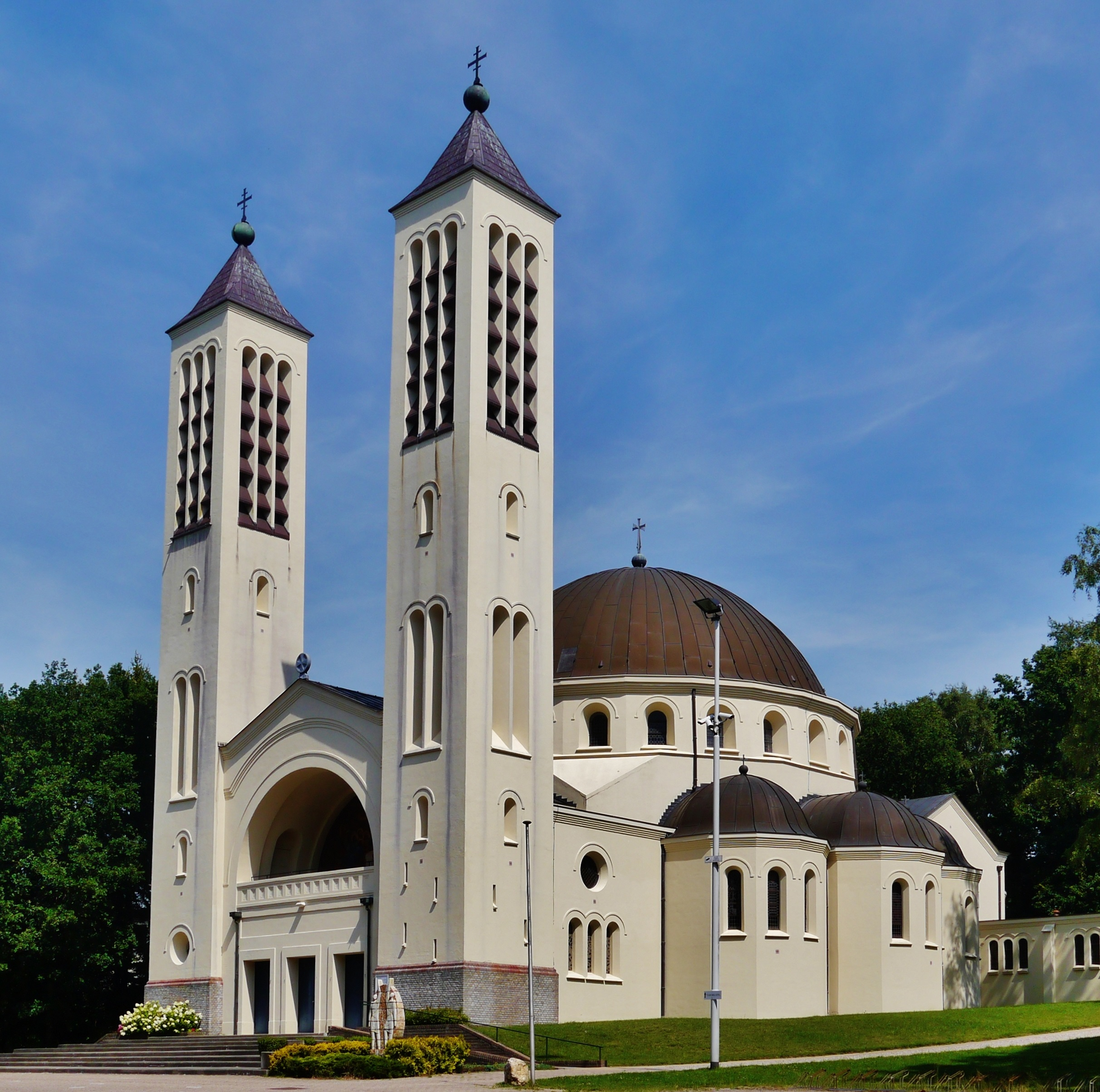 Zönakelkirche, Heilig Landstichting, Provinz Gelderland, Niederlande